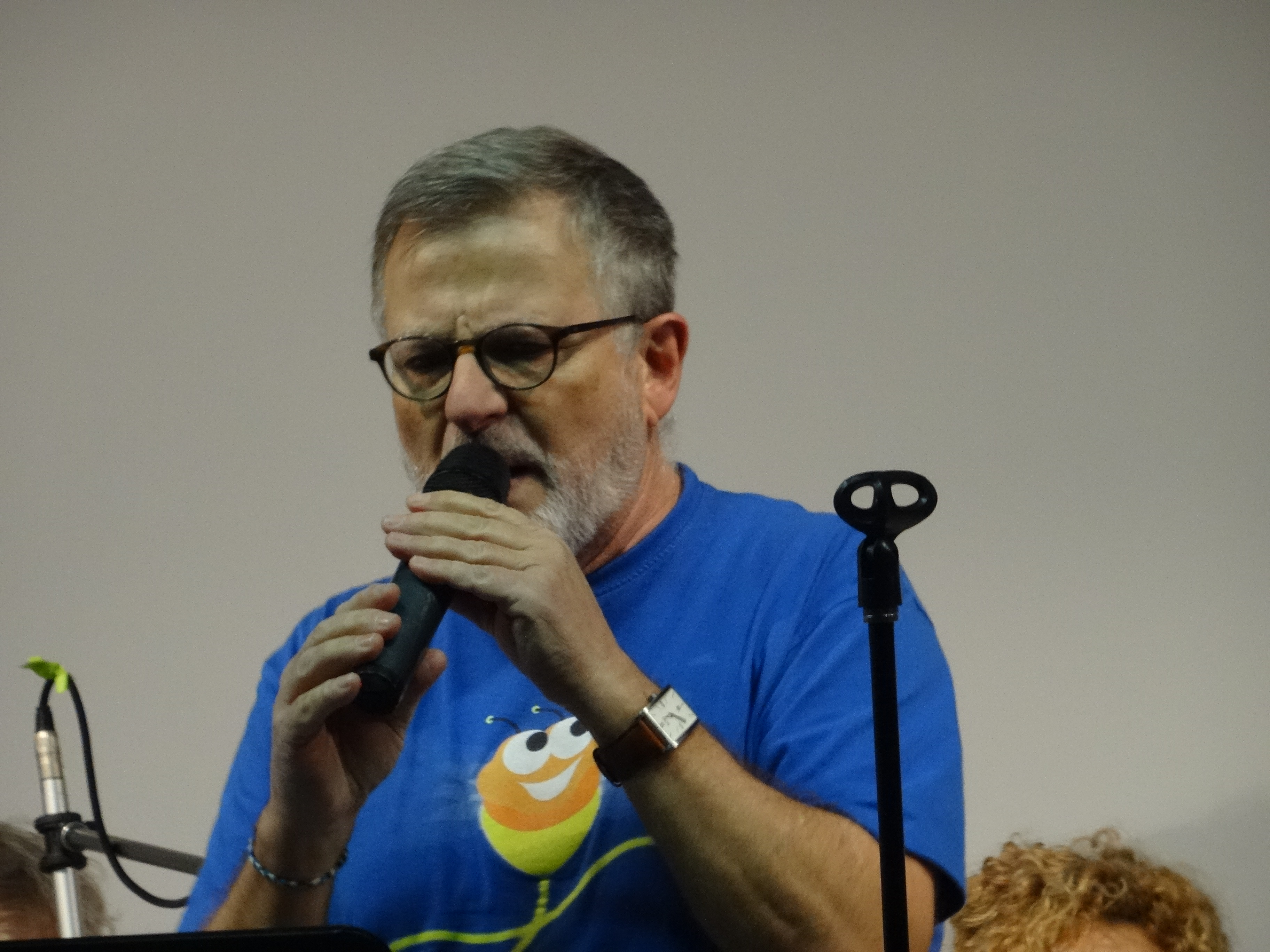 Ver título.